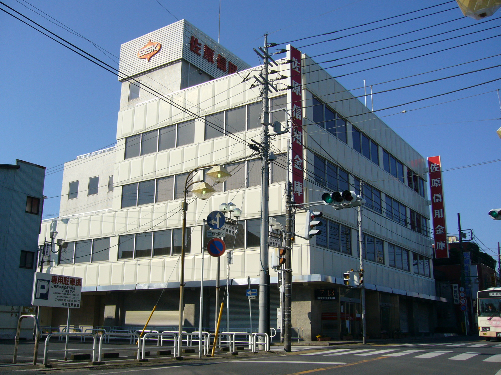 sawara shinkin bank,katori-city,japan